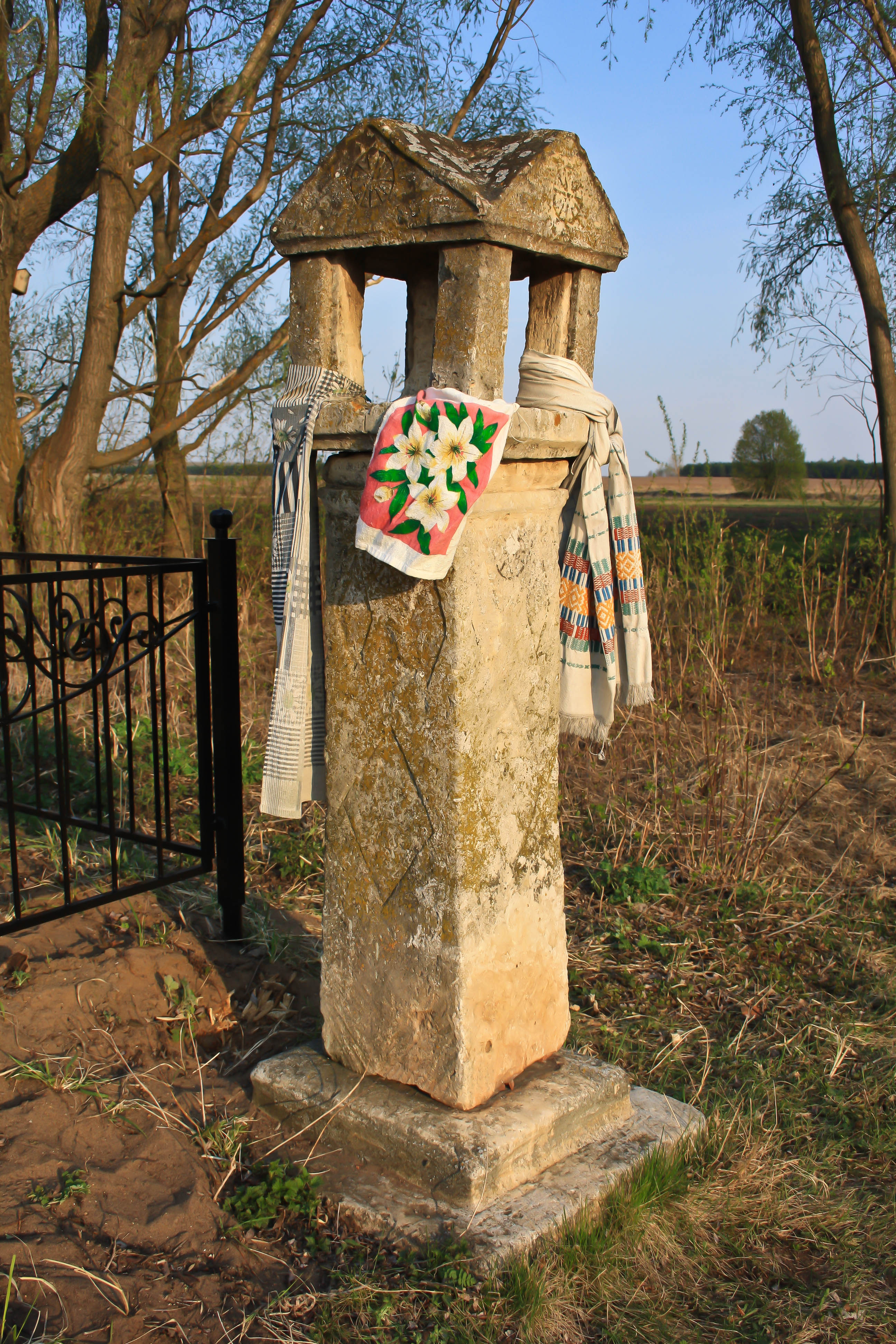 Каменная часовня – столобок, находящаяся в деревне Айталан (Республика Татарстан, Россия). Дата сооружения неизвестна.